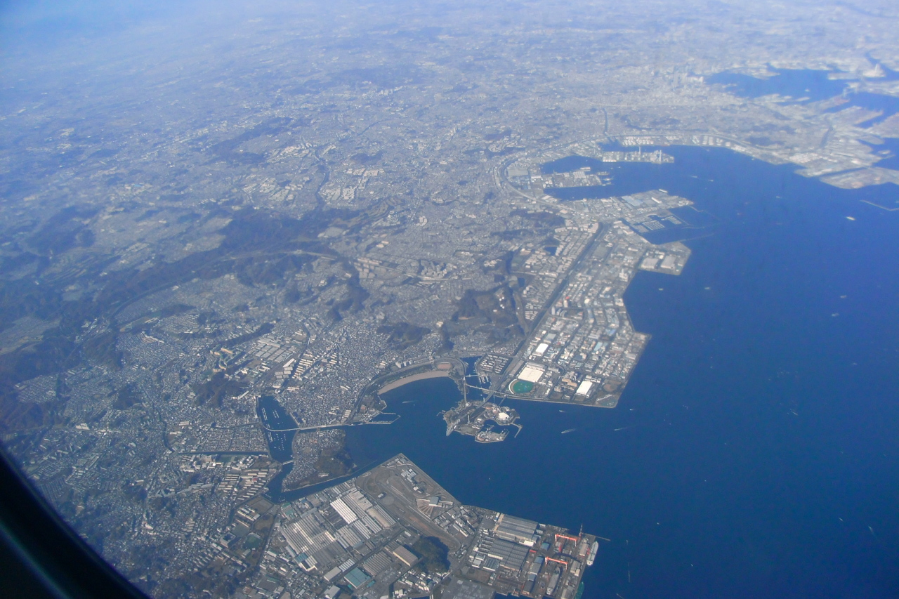 羽田発大阪伊丹空港行きANA 23便から撮影した、上空からの横浜の写真。金沢から中区方向へ。